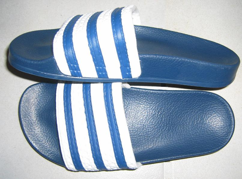 Un ejemplar de los pares originales de Adilette